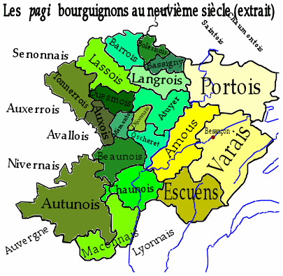 Les pagis bourguignons au 9e siècle